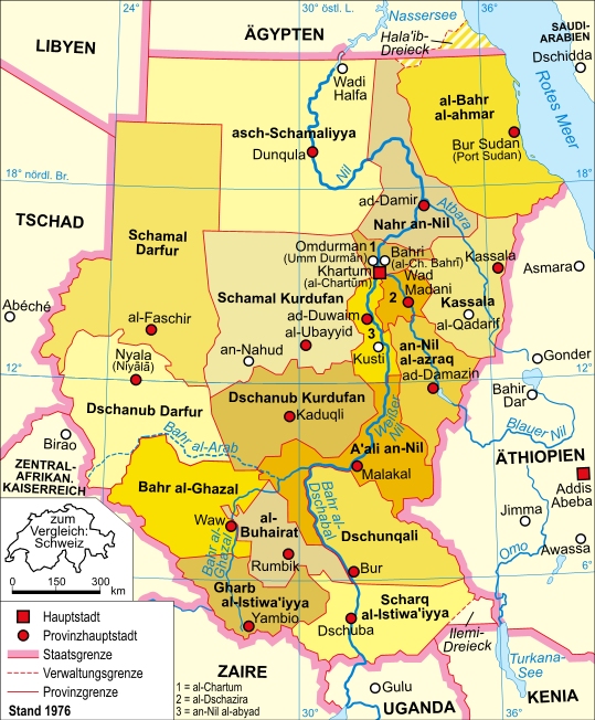 Politische Karte des Sudan (Stand 1976)